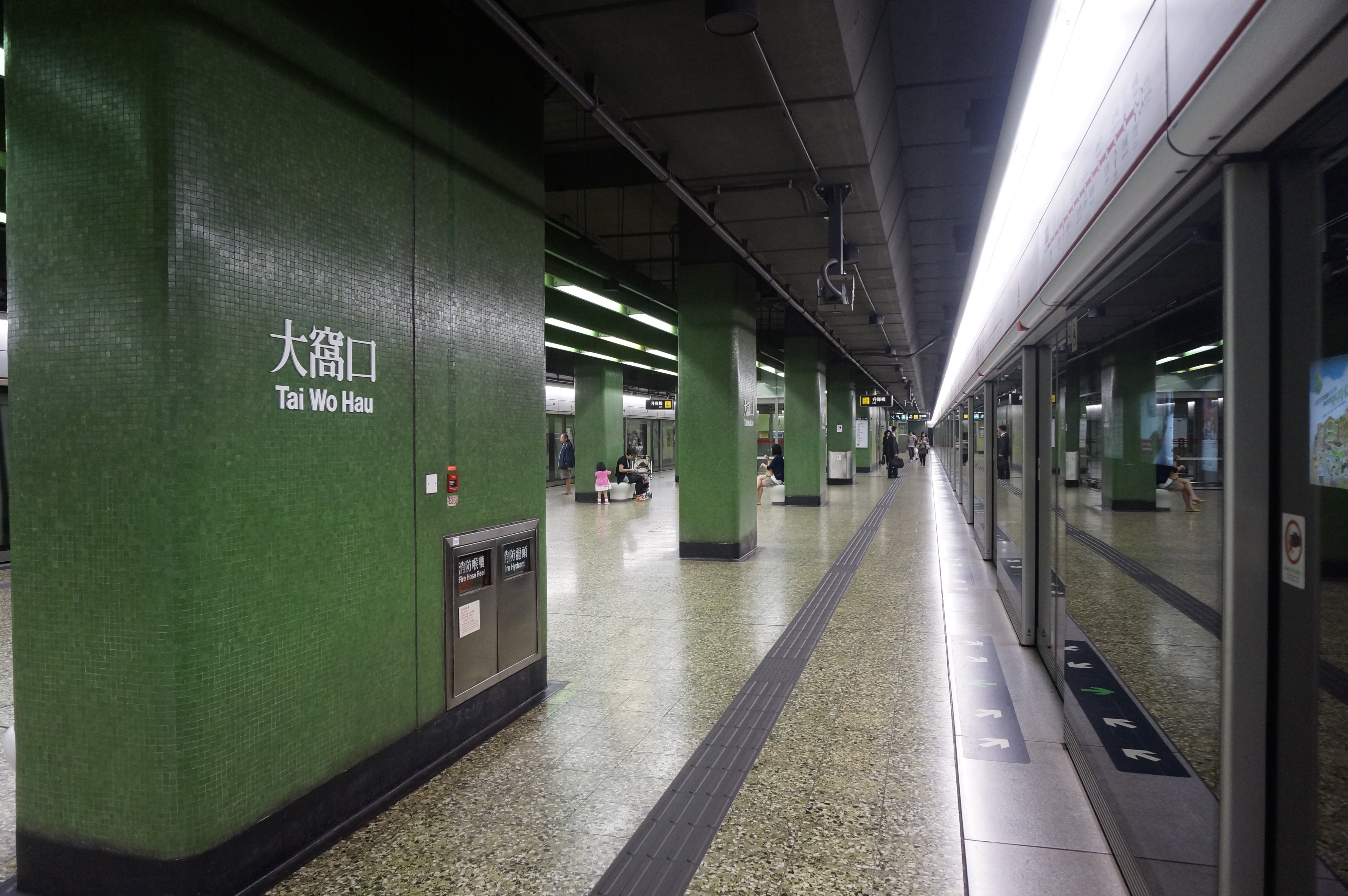 港鐵大窩口站月台